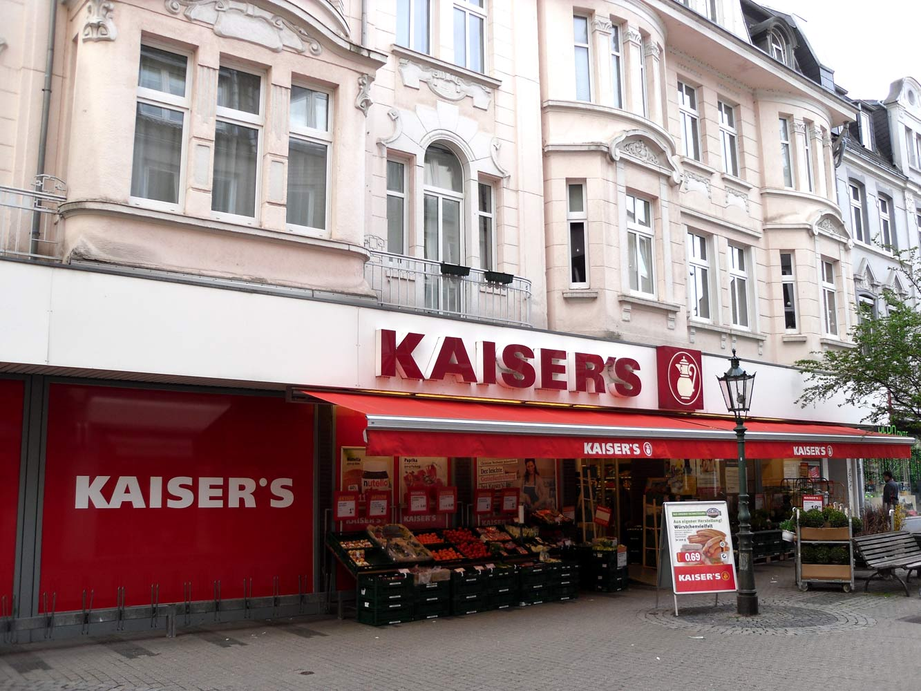 Lebensmittelgeschäft "Kaiser's", Hauptstraße 35, Düsseldorf-Benrath, Deutschland.